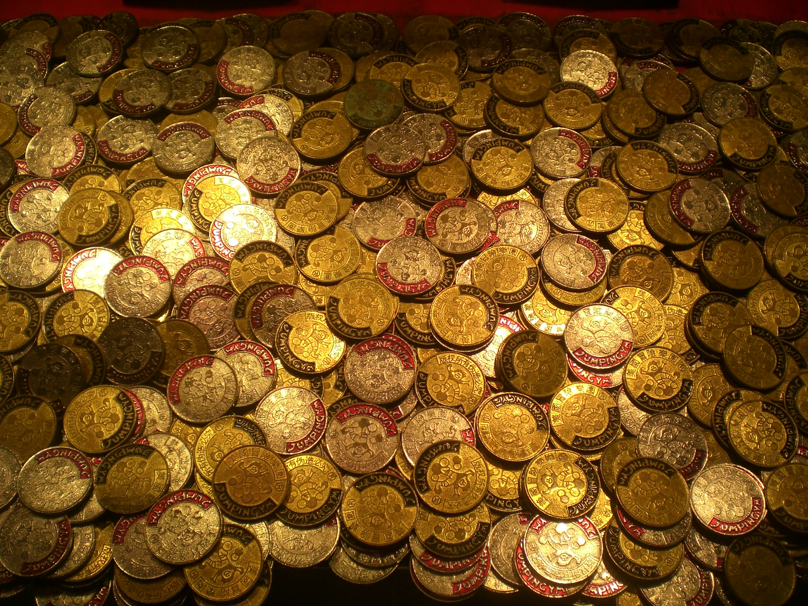 西九龍中心美國冒險樂園代幣, Dragon Centre, Sham Shui Po, Kowloon, Hong Kong.